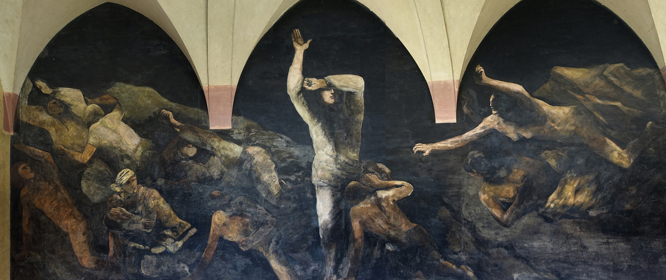 Heinrich Altherr (1878–1947), Wandbild von 1942–1946. Der Unentwegte, Der Künder, Kreuzgang, Staatsarchiv